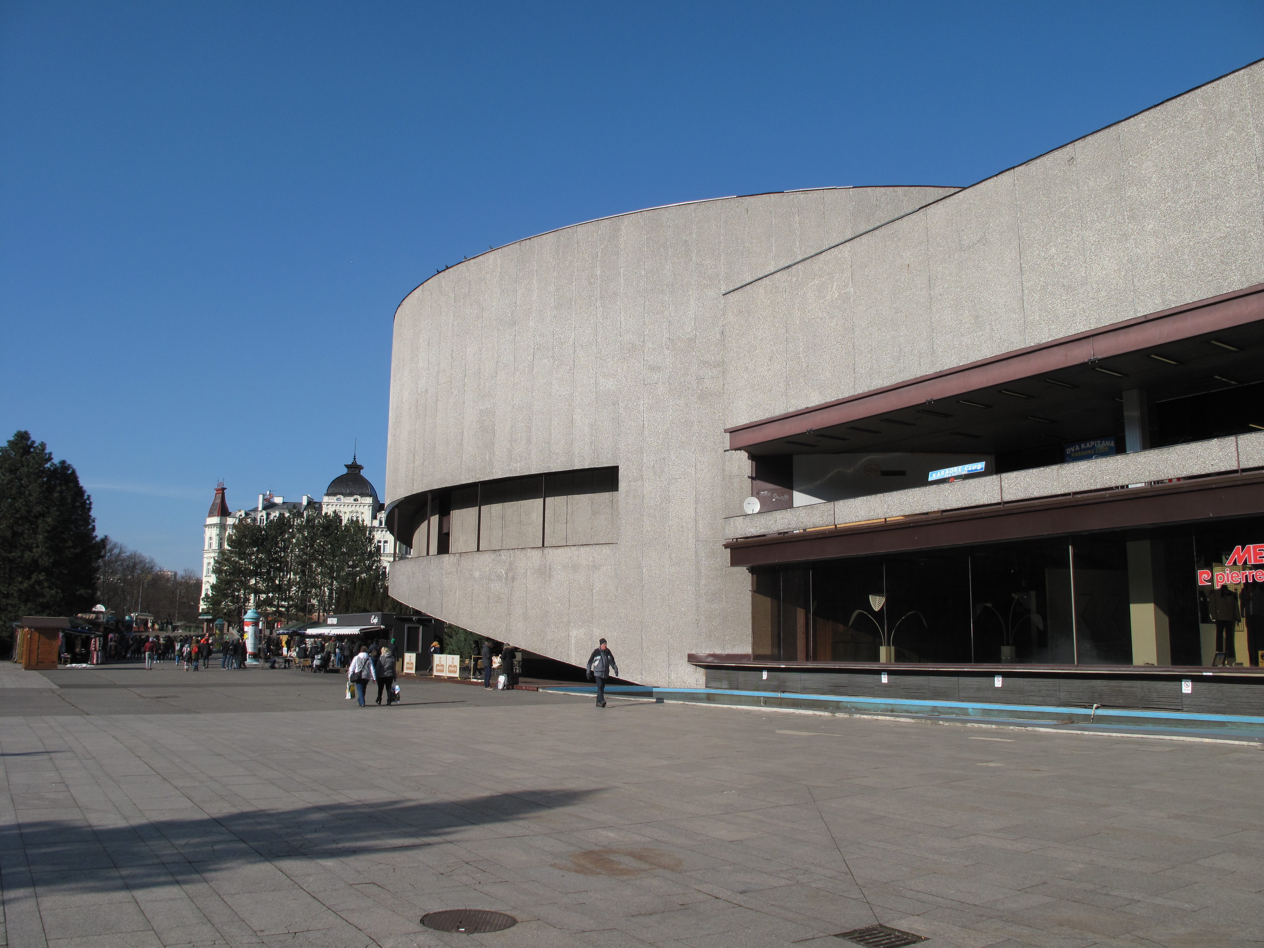 Hotel Thermal, Karlovy Vary.